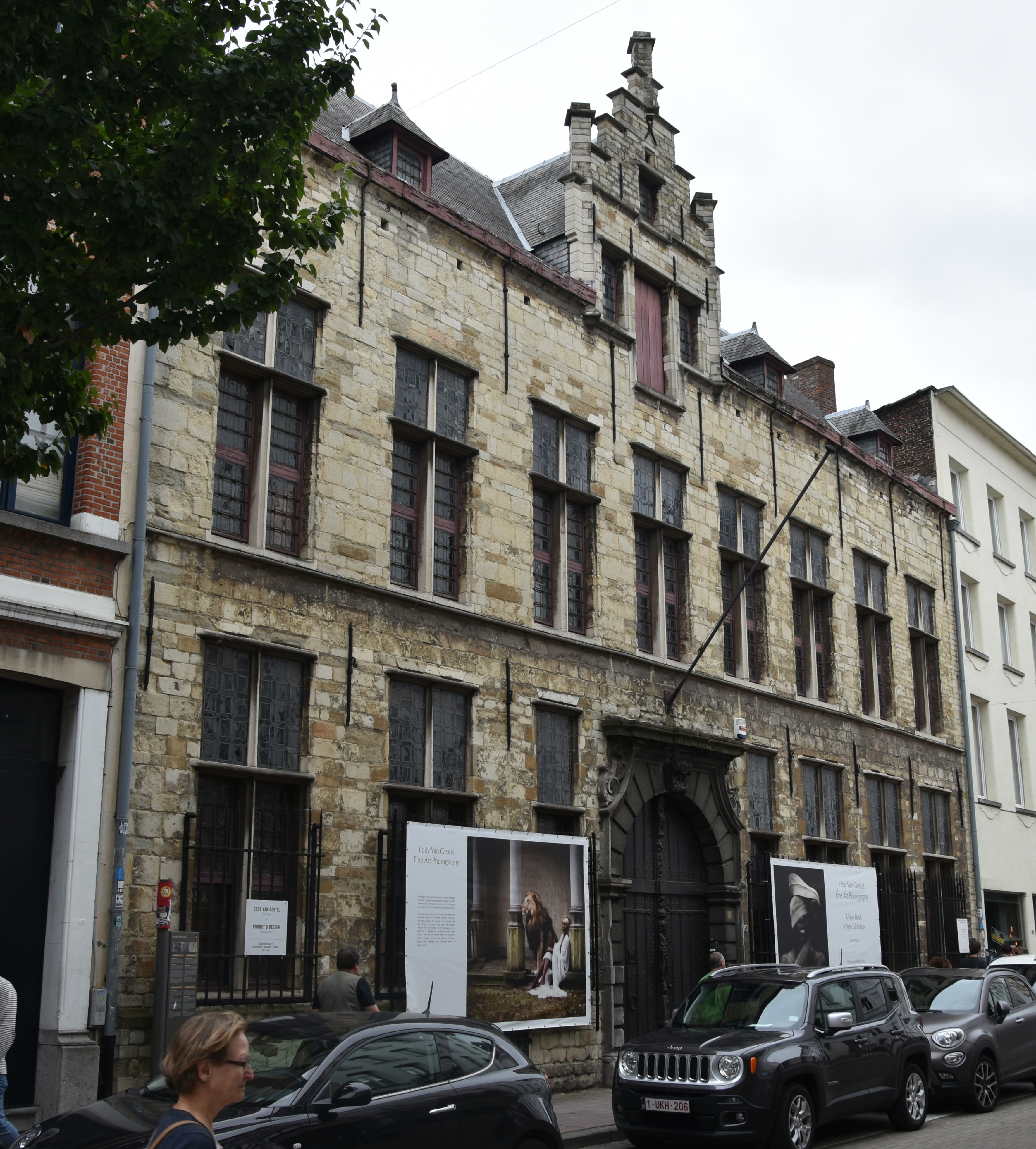 Mercator-Orteliushuis 19-08-2018 12-30-20 This photo of immovable heritage has been taken in the Flemish Region